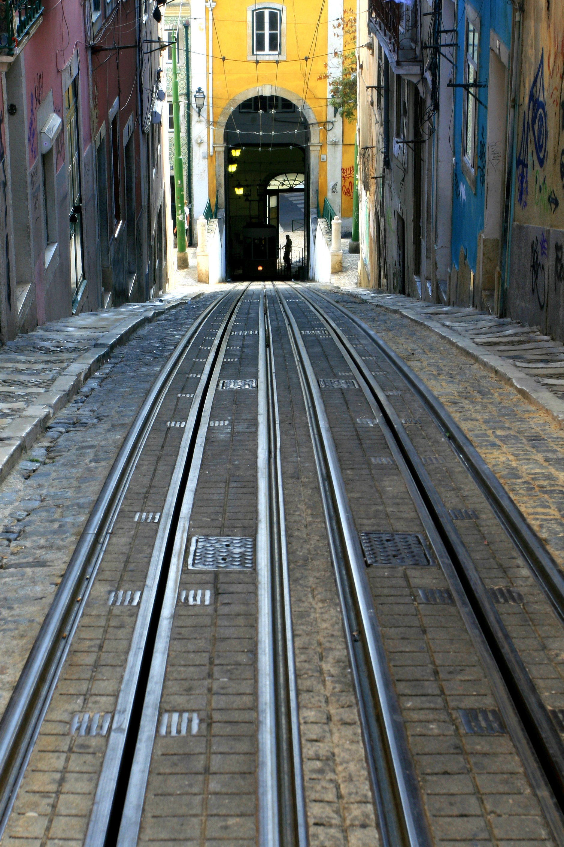 Descendo a pé o ascensor da Bica